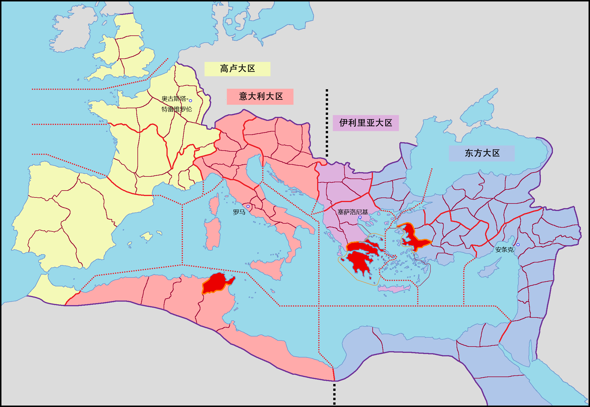 约公元400年的罗马帝国近卫大区。